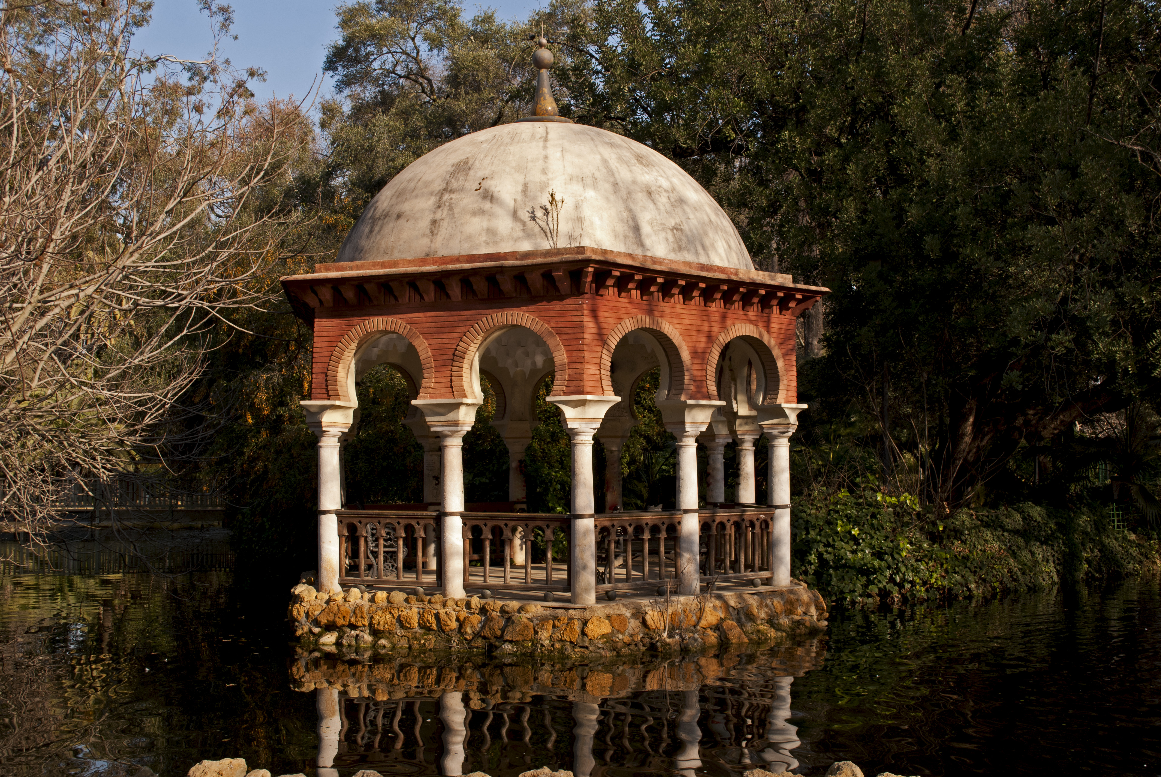 Isleta de los Patos (Parque de María Luisa) Sevilla